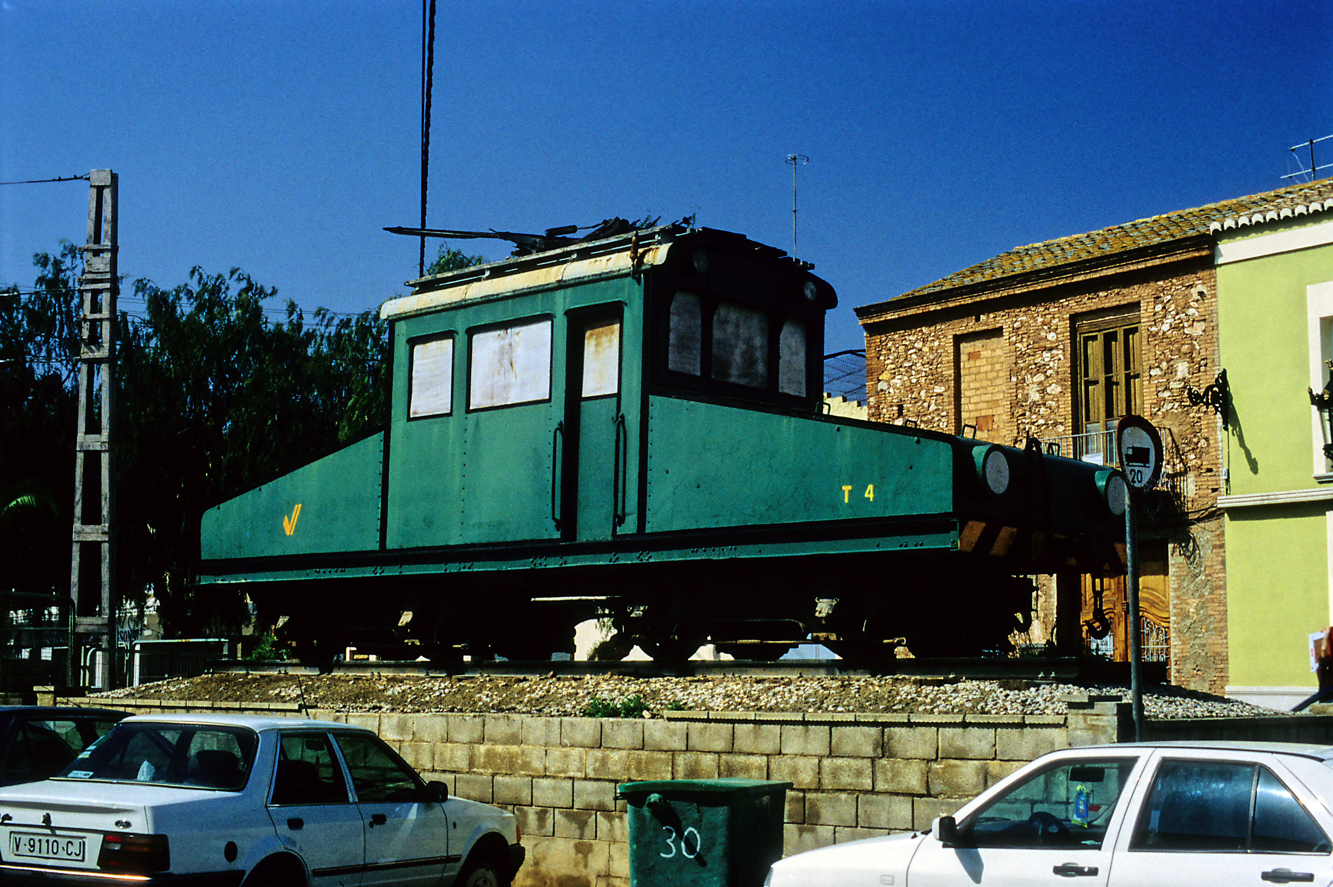 Lokomotivdekmal hinter den Prellböcken des Bahnhofs Rafabuñol. Die Aufstellung im Freien hat der Lokomotive jedoch schon sichtbar zugesetzt.